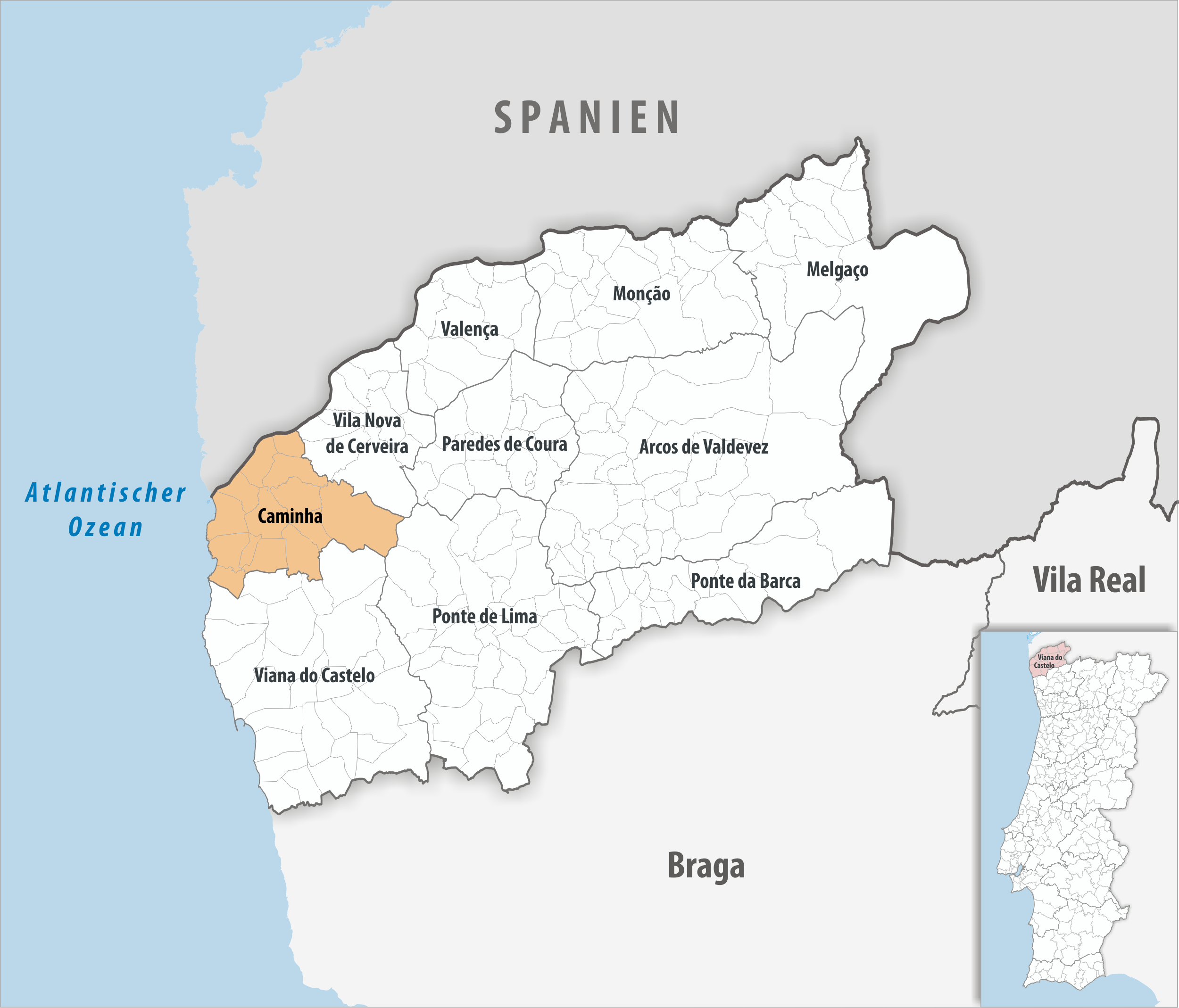 Kreis Caminha